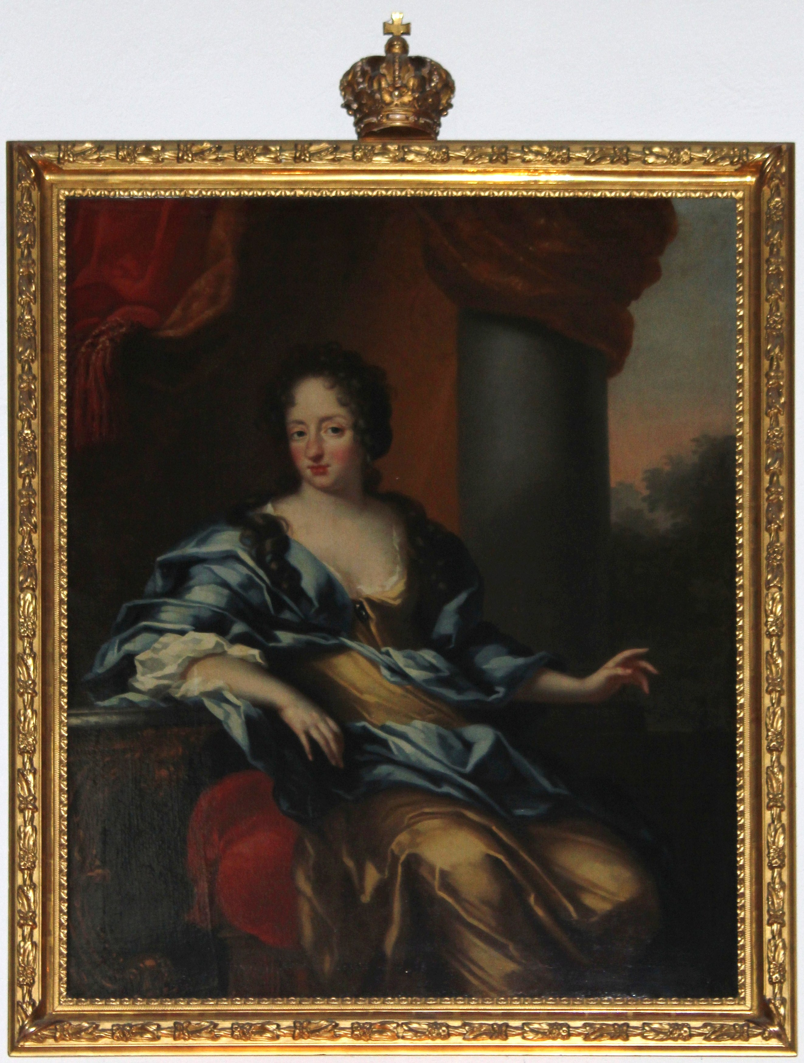 Portrait of Ulrika Eleonora, Queen of Sweden (1688-1741)label QS:Lsv,"Porträtt av Ulrika Eleonora, efter vilken kyrkan är uppkallad (det officiella namnet är Ulrika Eleonora kyrka)."